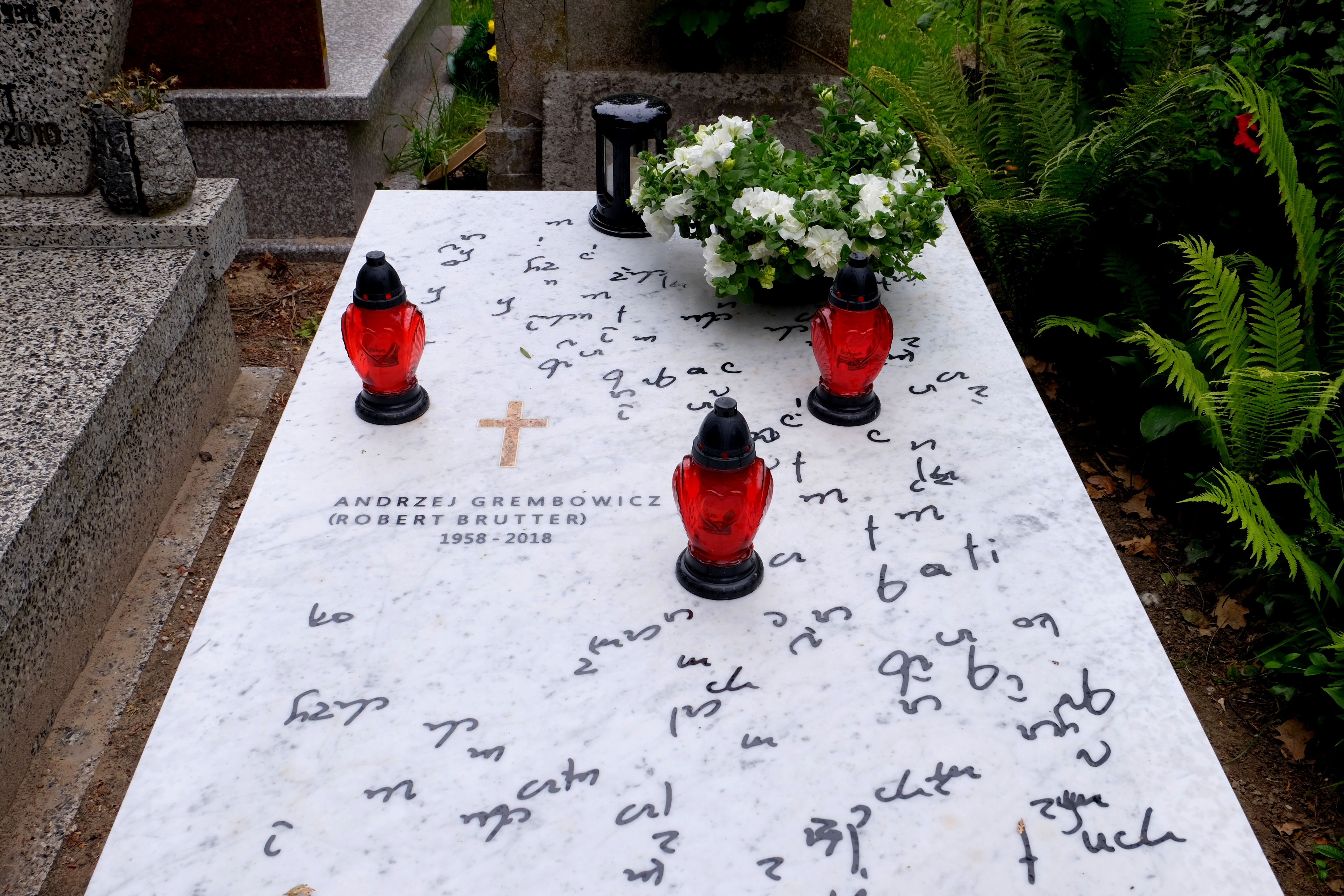 Grób pisarza i scenarzysty Andrzeja Grembowicza na Cmentarzu Wojskowym na Powązkach w Warszawie